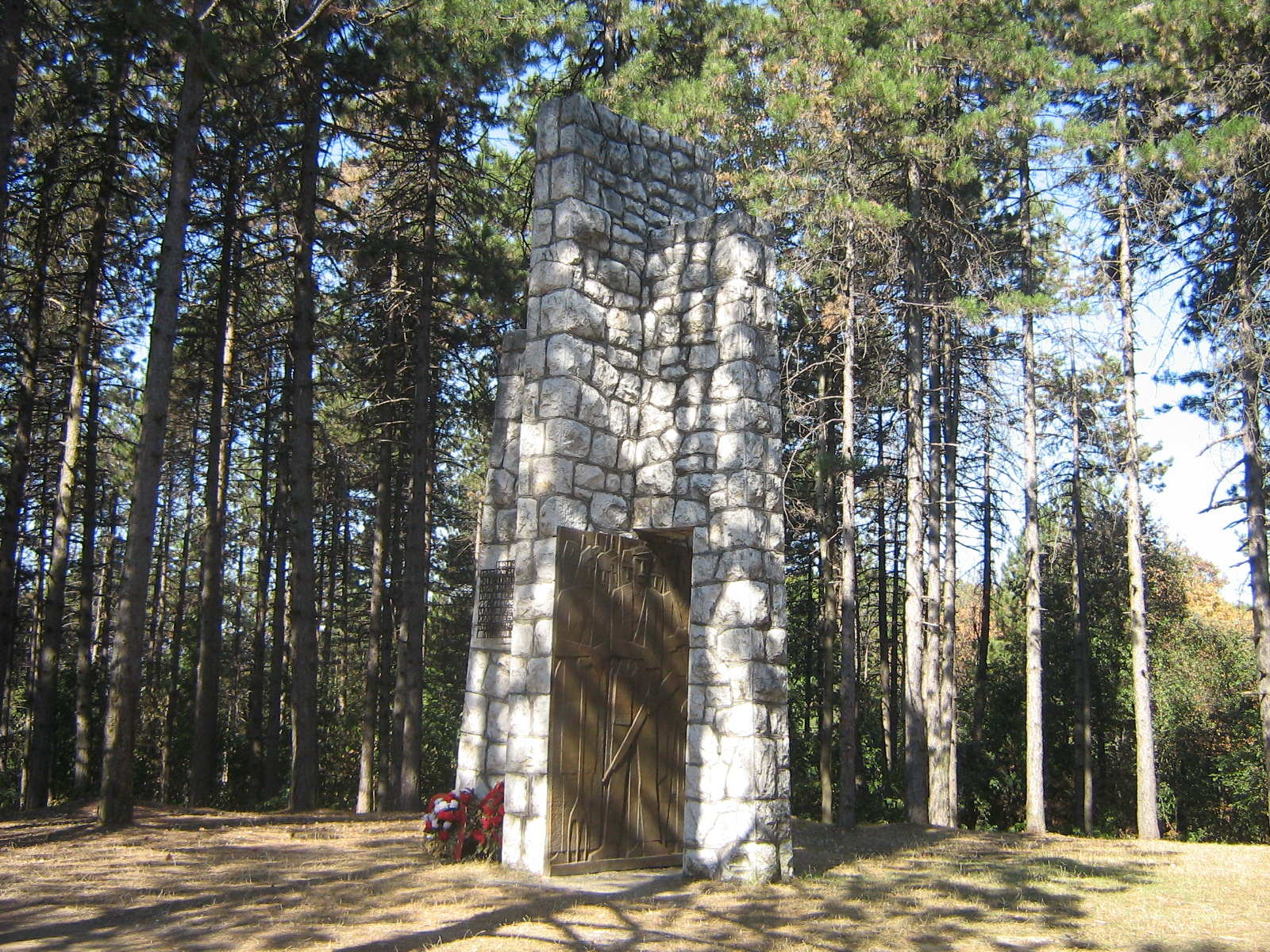 Споменик на Преслици